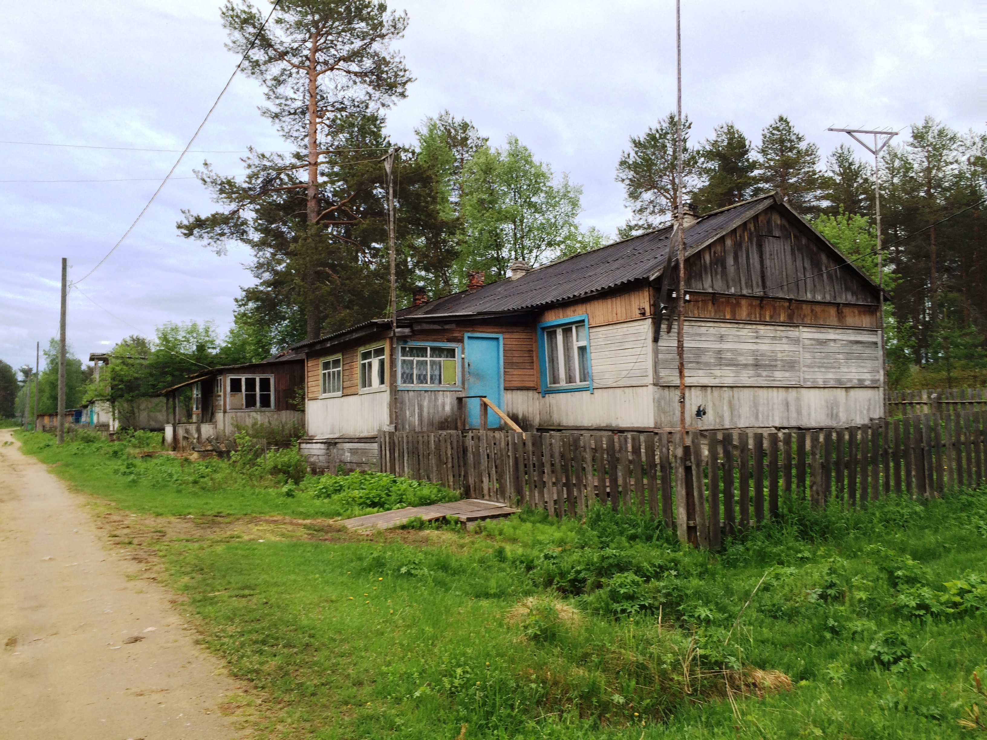 Кимоваара